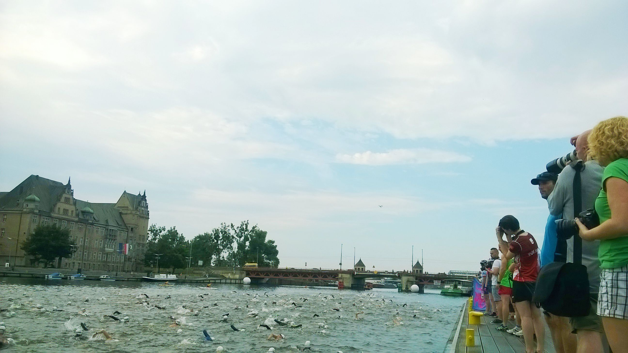 Triathlon w Szczecinie 5 lipca 2015